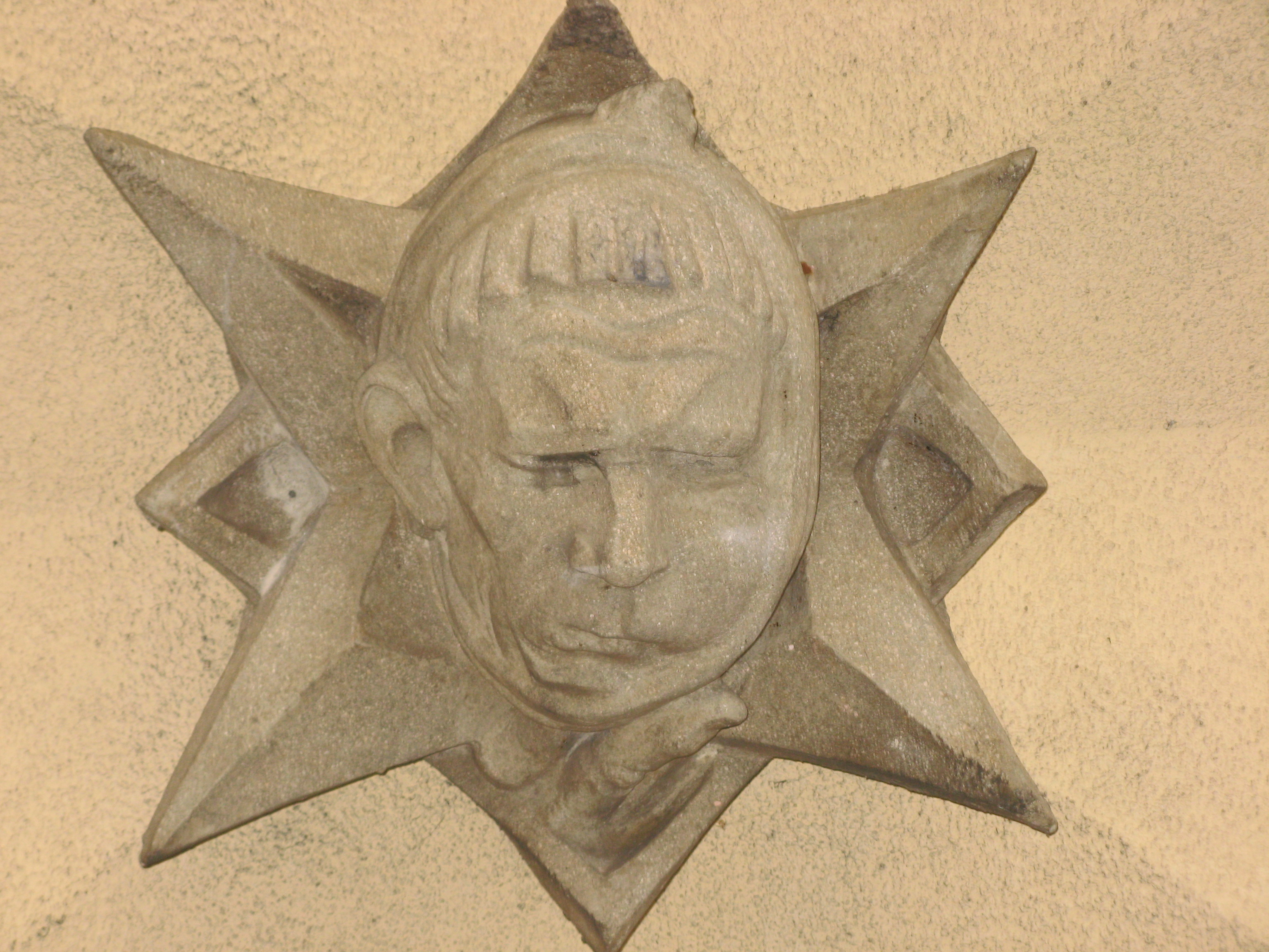 Relief von der Wohnhausanlage Bebelhof (1925/26) in Wien-Meidling